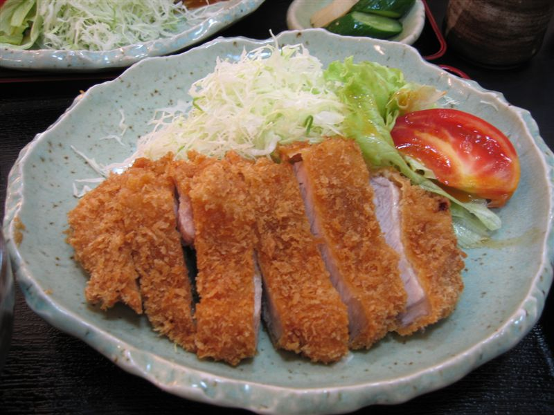 とんかつ